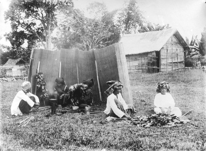 Repronegatief. Voor de bereiding van kopi daoen worden de koffiebladeren geroosterd op een zacht vuur totdat de bladeren bruin en droog zijn geworden, Sumatra's Westkust